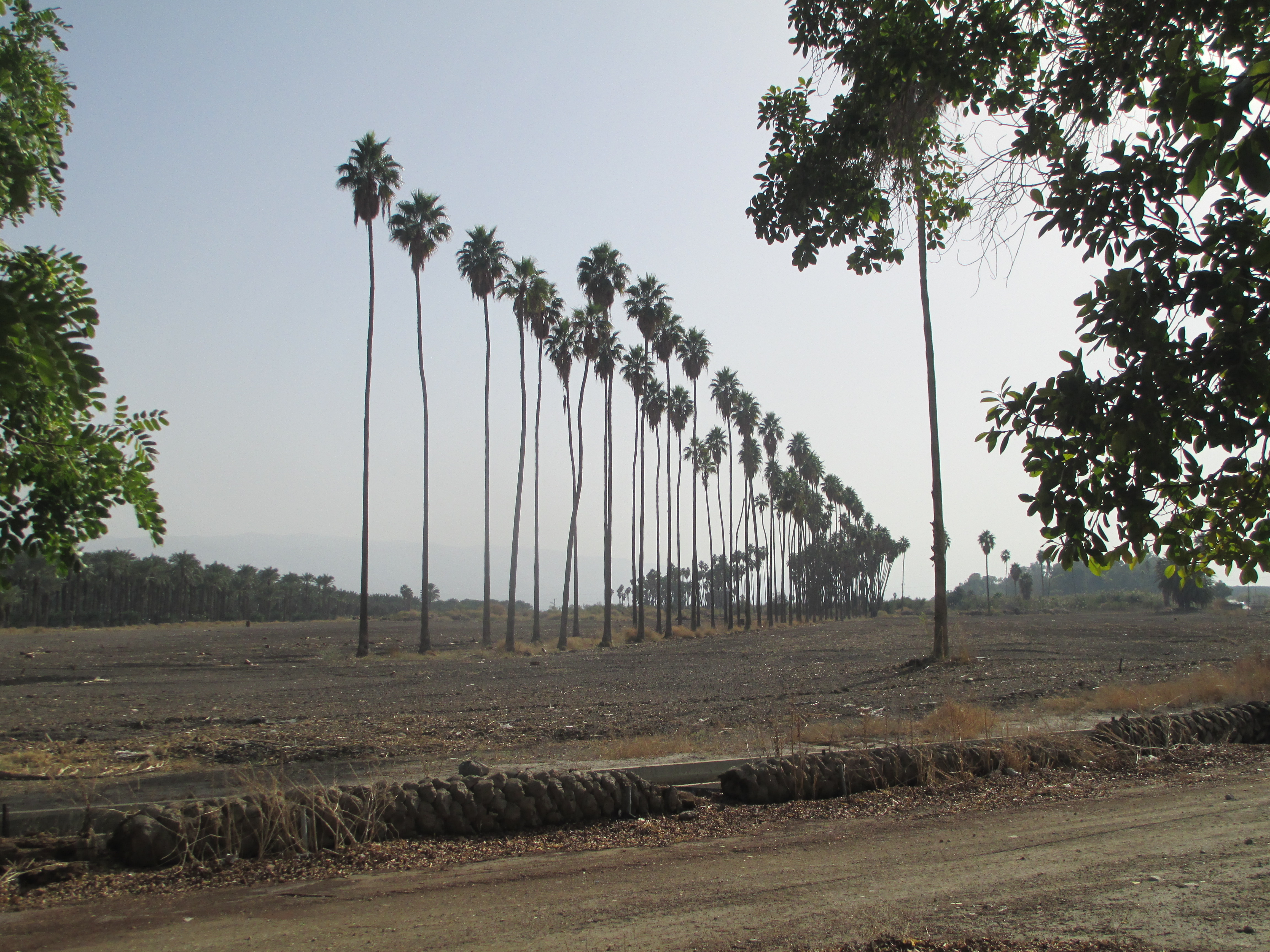 שדרת דקלי וושינגטוניה שנטעו הטמפלרים בעמק בית שאן